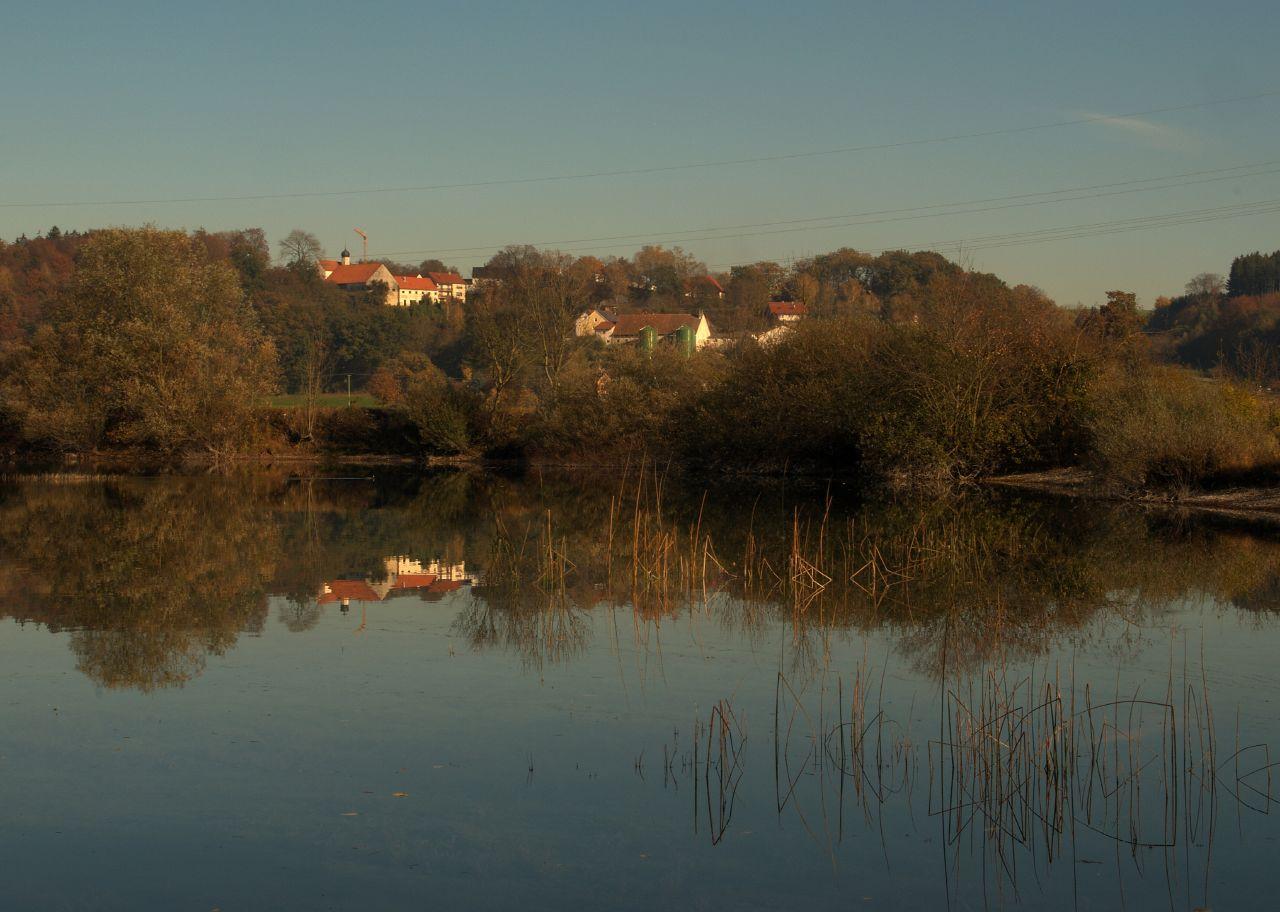 Auer See (?), Rehling-Au/Scherneck